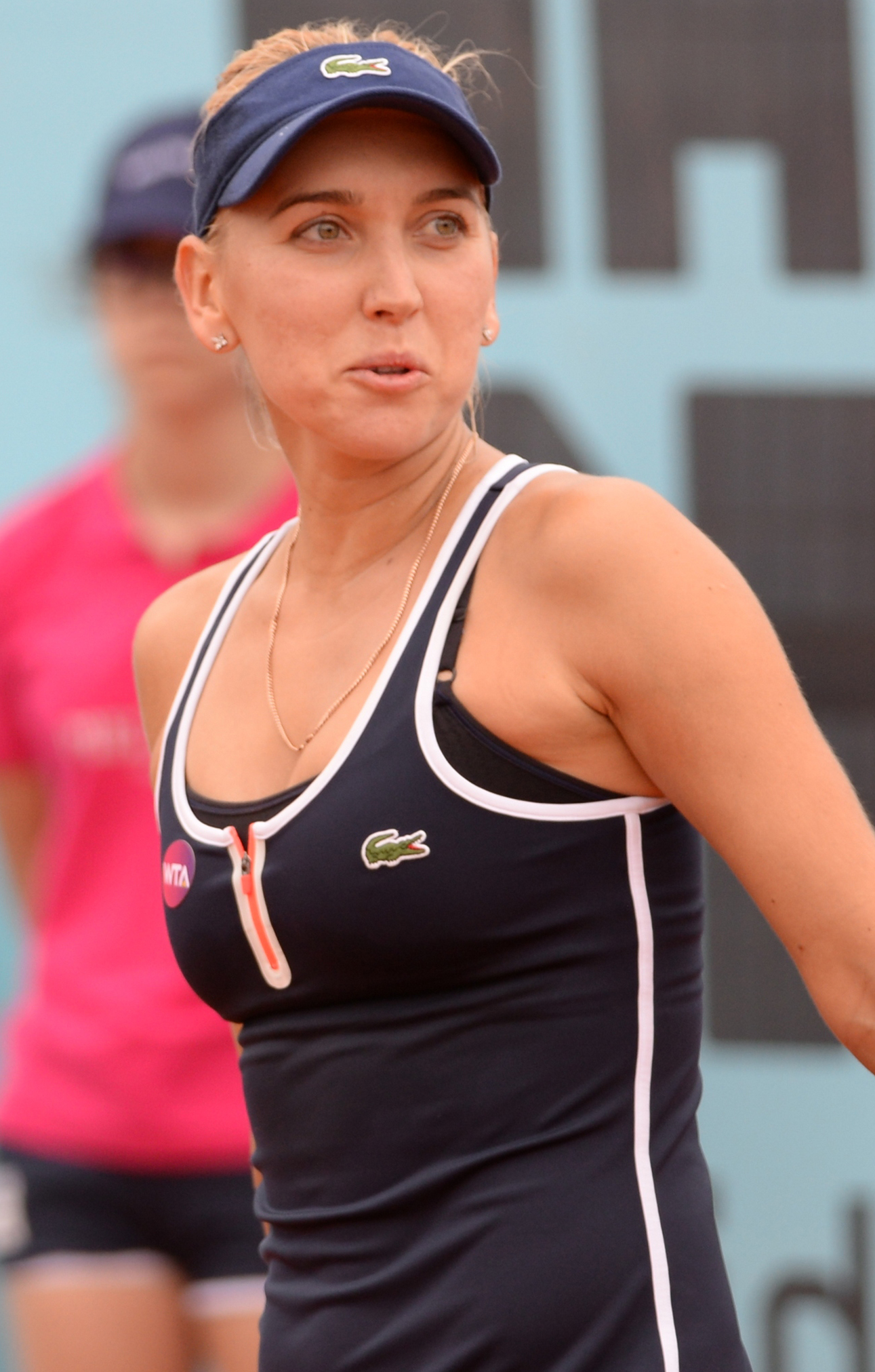 Elena Vesnina